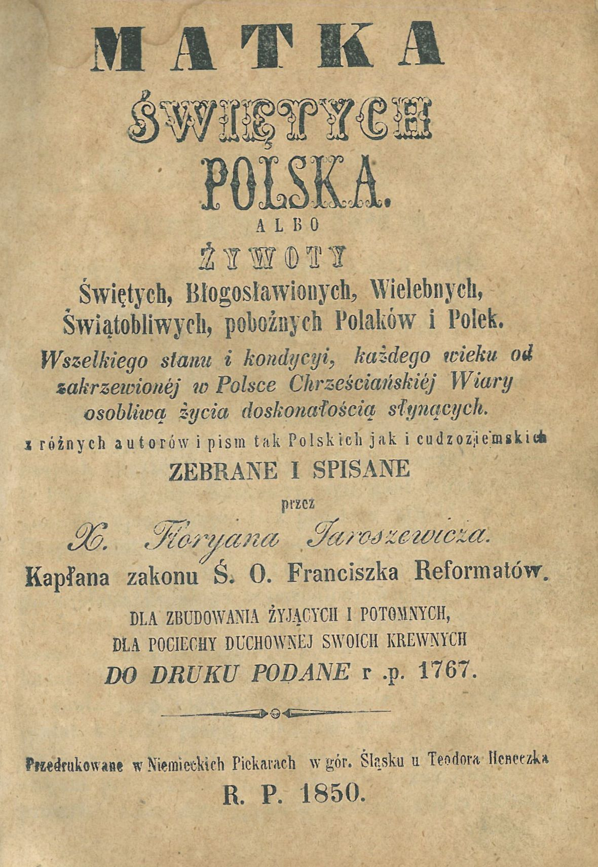 Karta tytułowa druku Matka świętych Polska autorstwa Floriana Jaroszewicza z 1850 r.